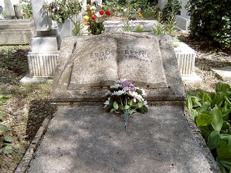 Erdős Renée sírja Budapesten. Új köztemető: 29/1-1-81.